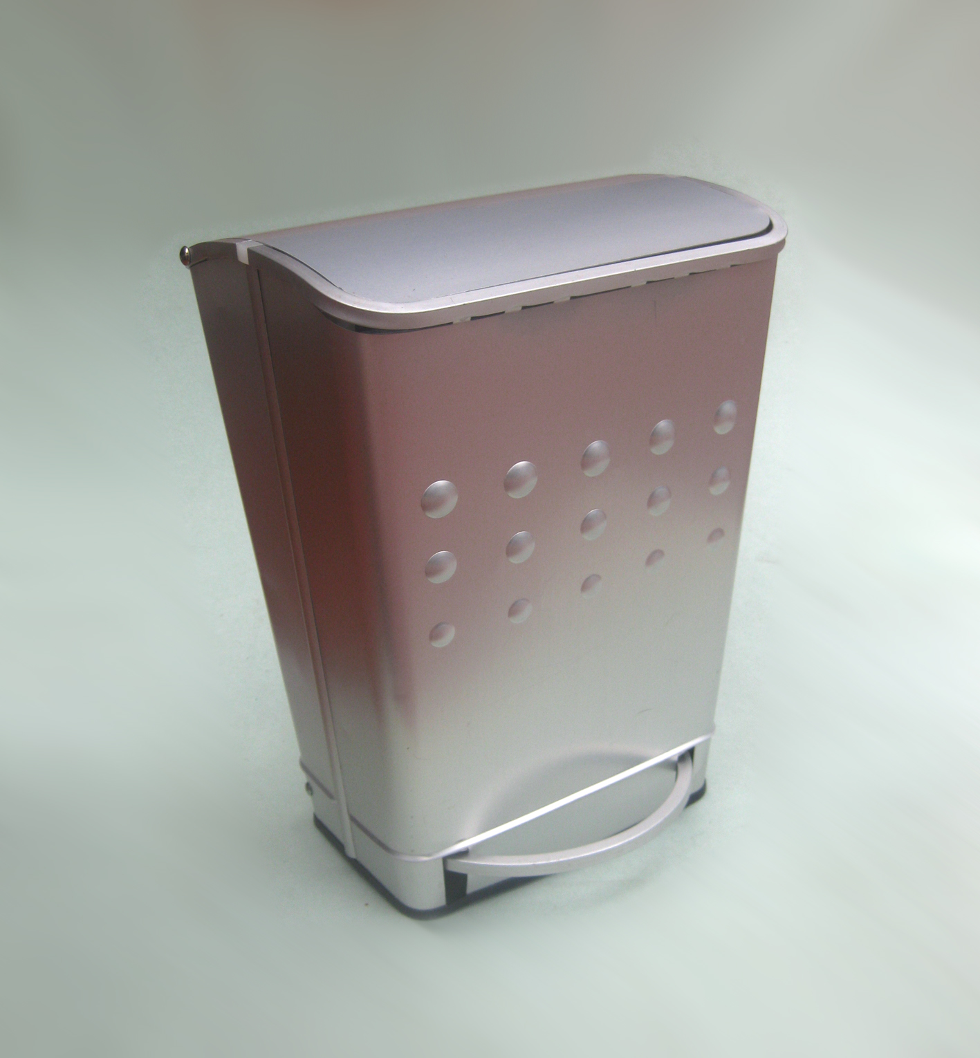 Treteimer aus Aluminium, hergestellt von "Masthellas". Entwurf: Mastroyanni.